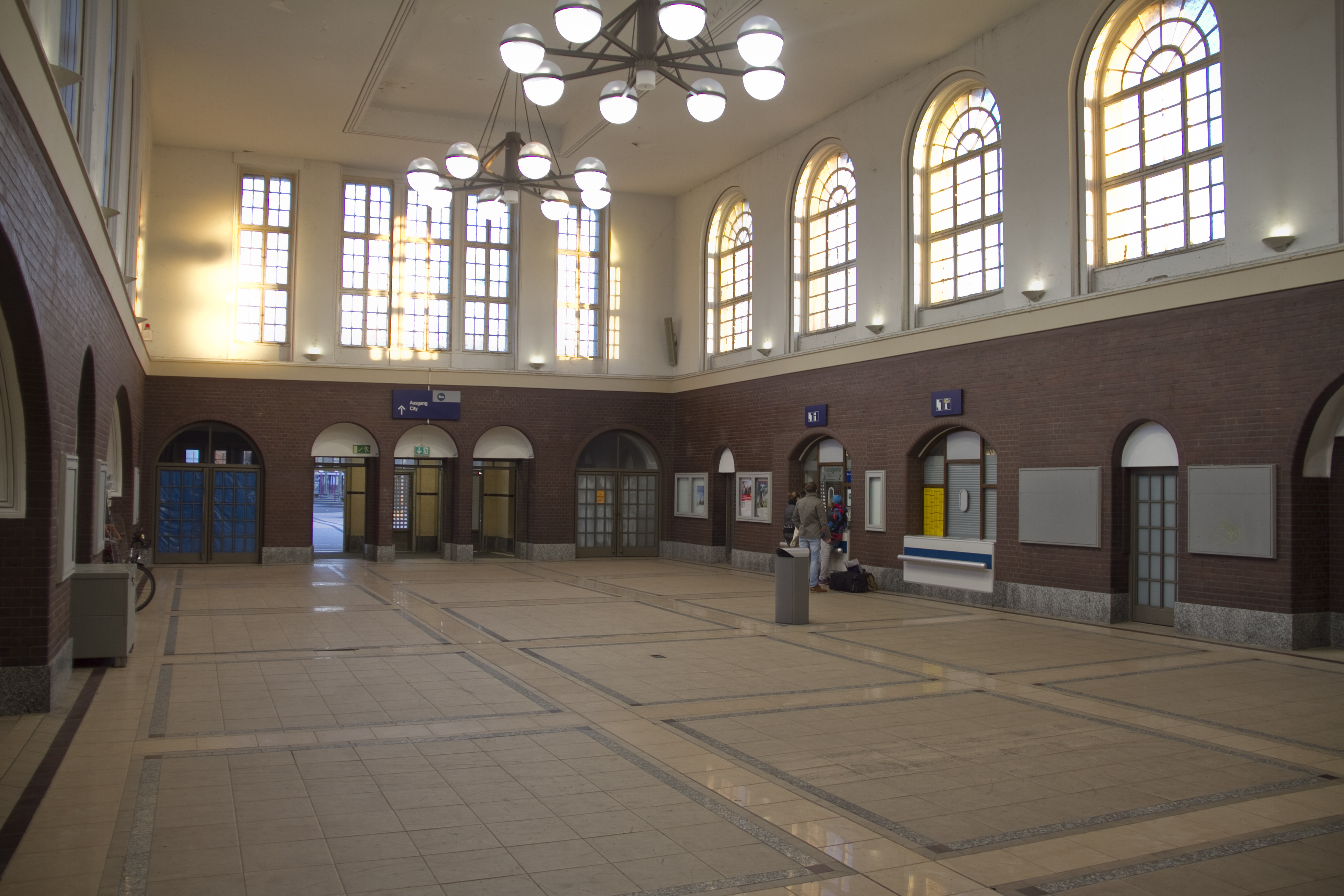 Bahnhof Zeitz, Empfangshalle